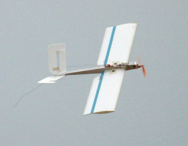 Avion radiocommandé indoor électrique. Caractéristiques : Moteur triphasé brushless LRK à cage tournante 60w watts : La page du Tweety Torque Accus LiPoli (litium polymére) 3 modules de 700 mA Poid : 275 grammes Autonomie : 15 minutes Construit par Christian et Loic Bonnafous